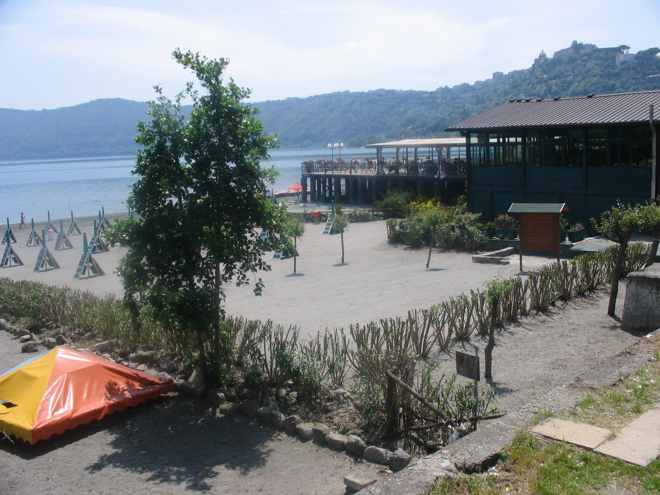 Castel Gandolfo, Lazio